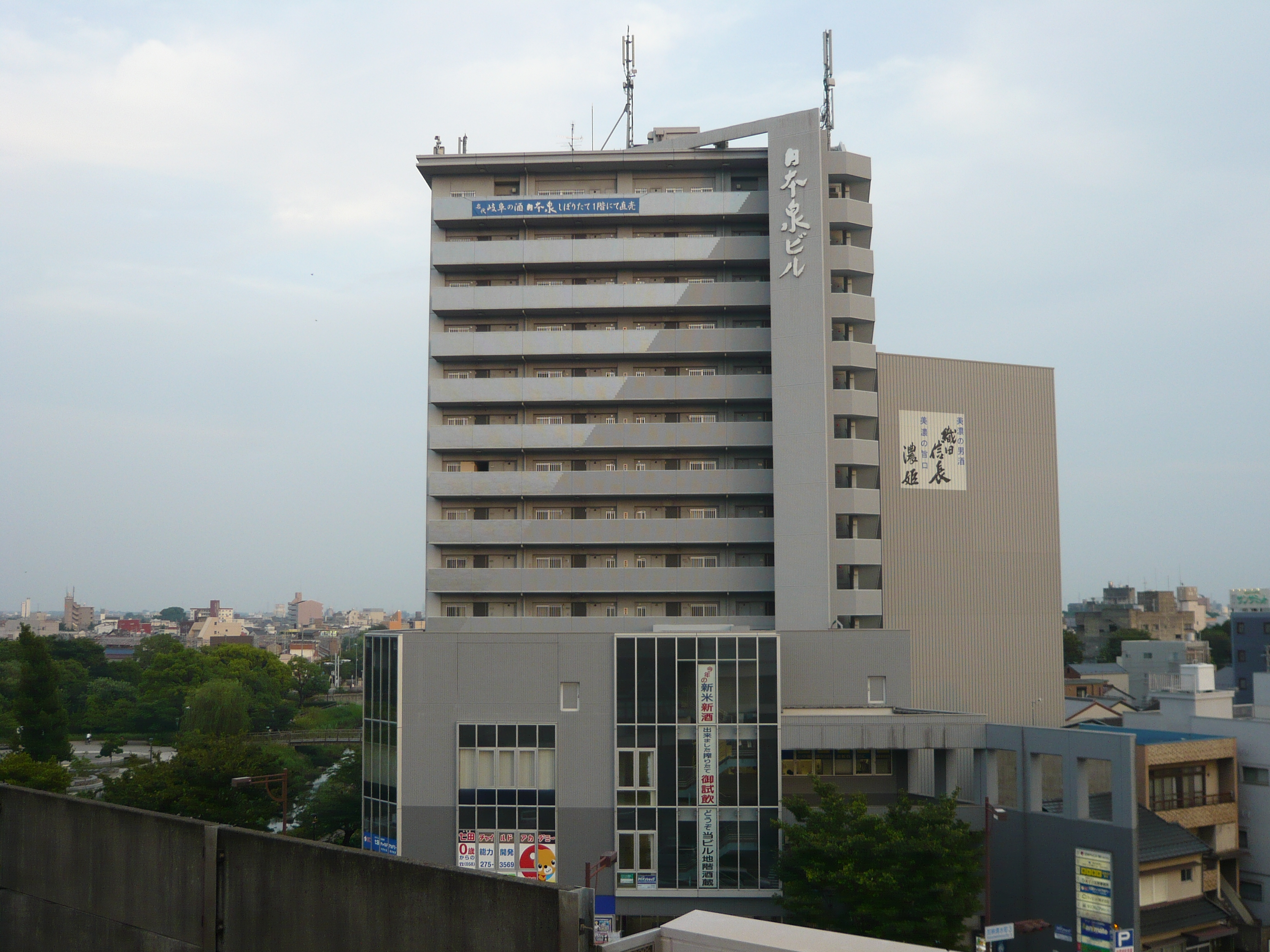 日本泉酒造本社ビル